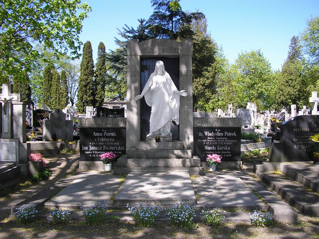 Wladyslaw's Piorek grave in Nowofarny Cemetery, Bydgoszcz